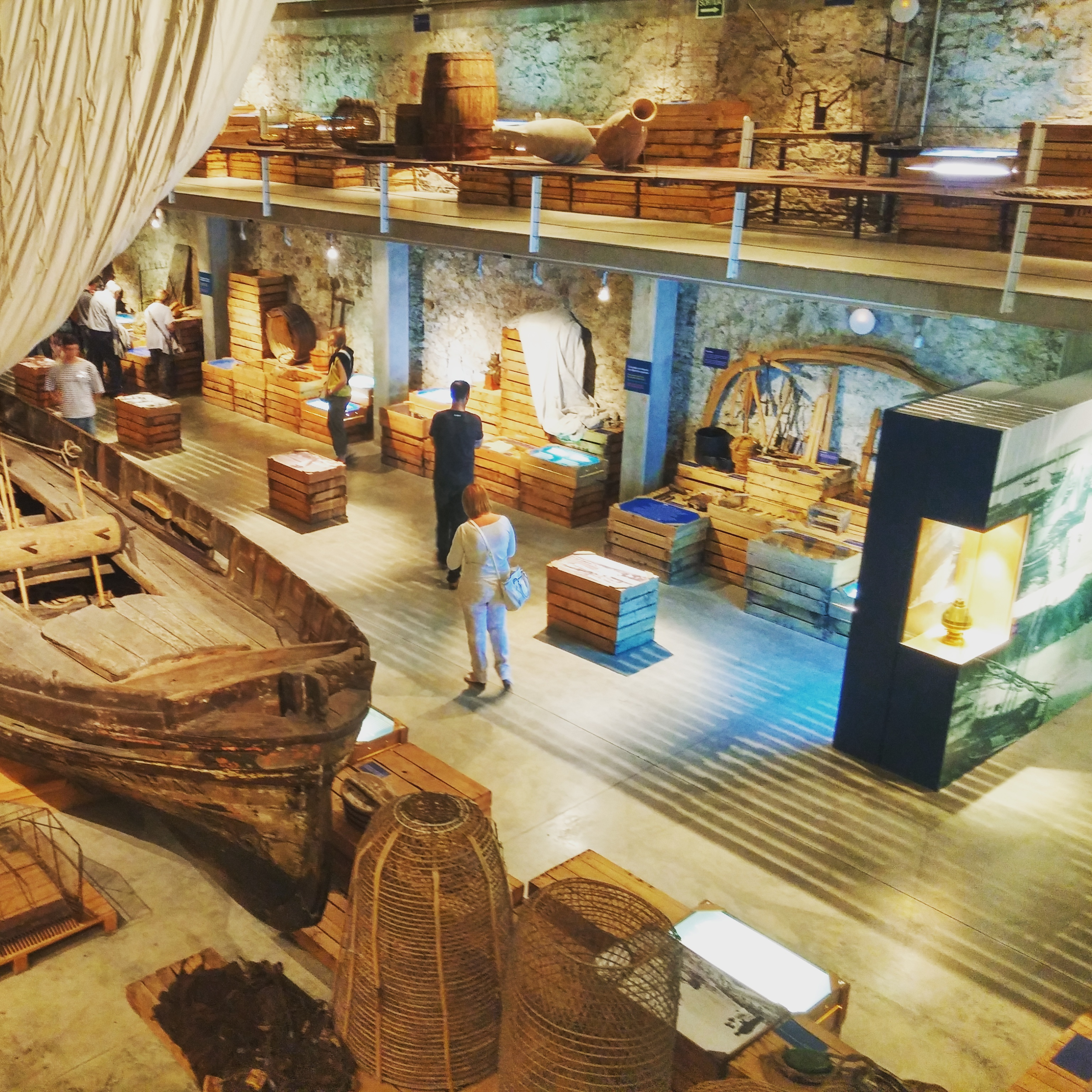 Vista general de l'exposició permanent del Museu de la Pesca, amb l'embarcació 'San Juan' en primer terme